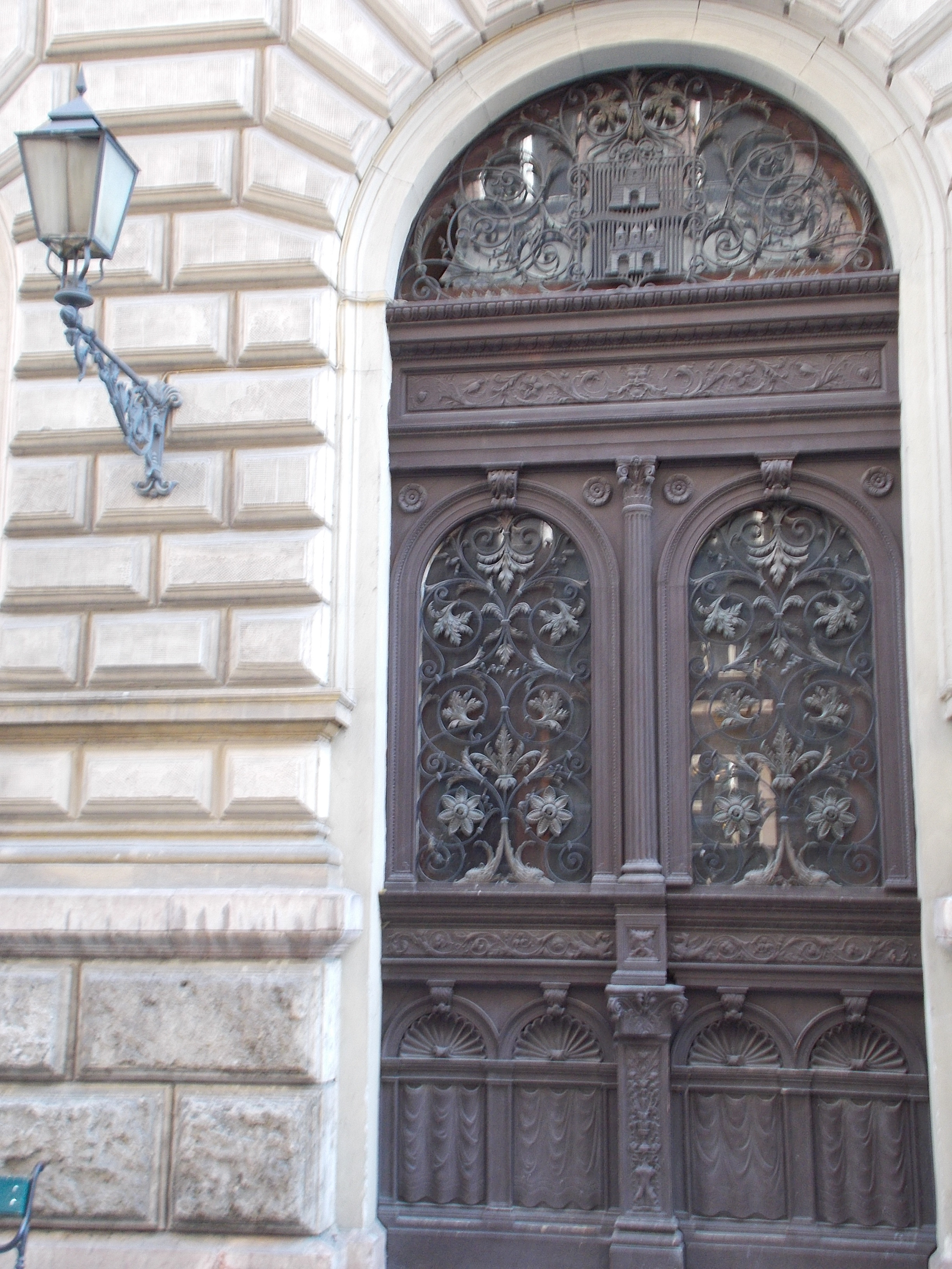 'Újvárosháza.' Kapu és lámpa. Műemlék ID 646 - Budapest V., Váci utca 62-64. . This is a photo of a monument in Hungary. Identifier: 646